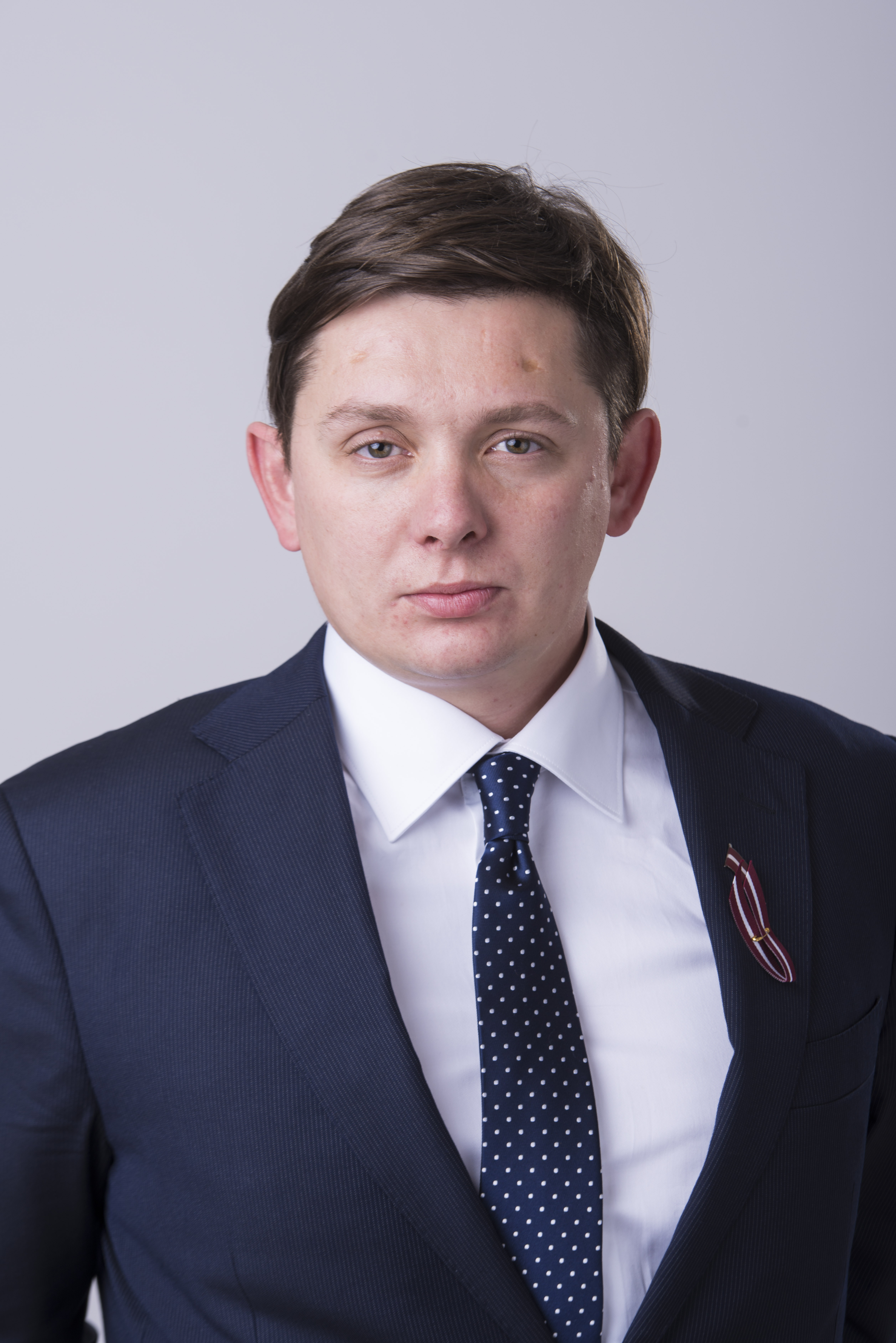 2014.gada 9.decembris. 12.Saeimas deputāts Arturs Kaimiņš. Foto: Reinis Inkēns, Saeimas Kanceleja Izmantošanas noteikumi: saeima.lv/lv/autortiesibas